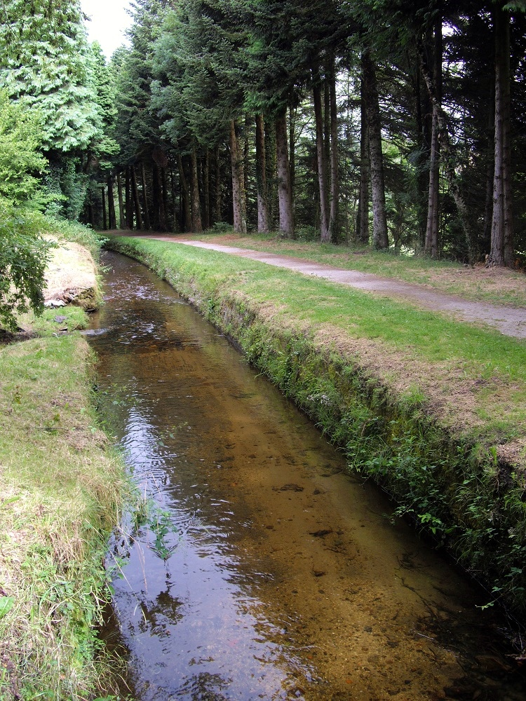 Rigole de la montagne (France)